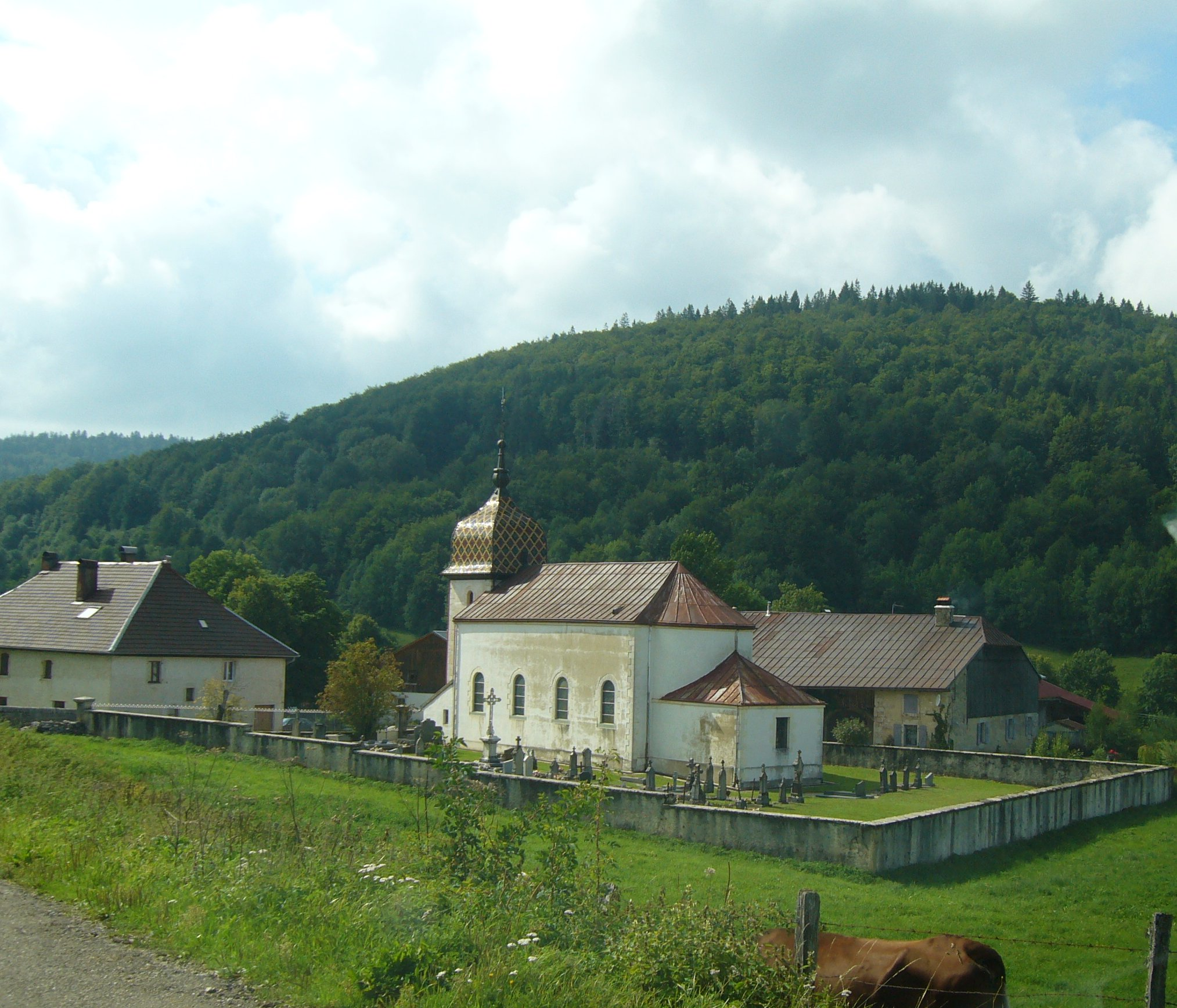 Auteur: Utilisateur:Suaudeau Description: Vue de l'église du hameaux Boujeons de la commune de Remoray-Boujeons.